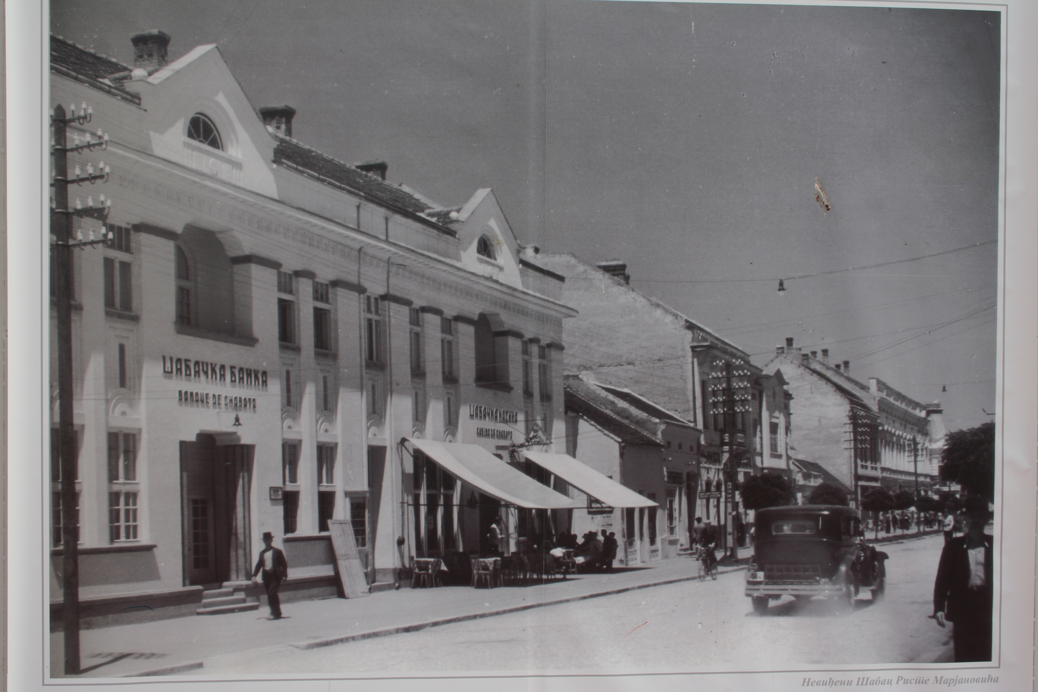 Izložba slika starog Šapca, autora Riste Marjanovića na otvorenom